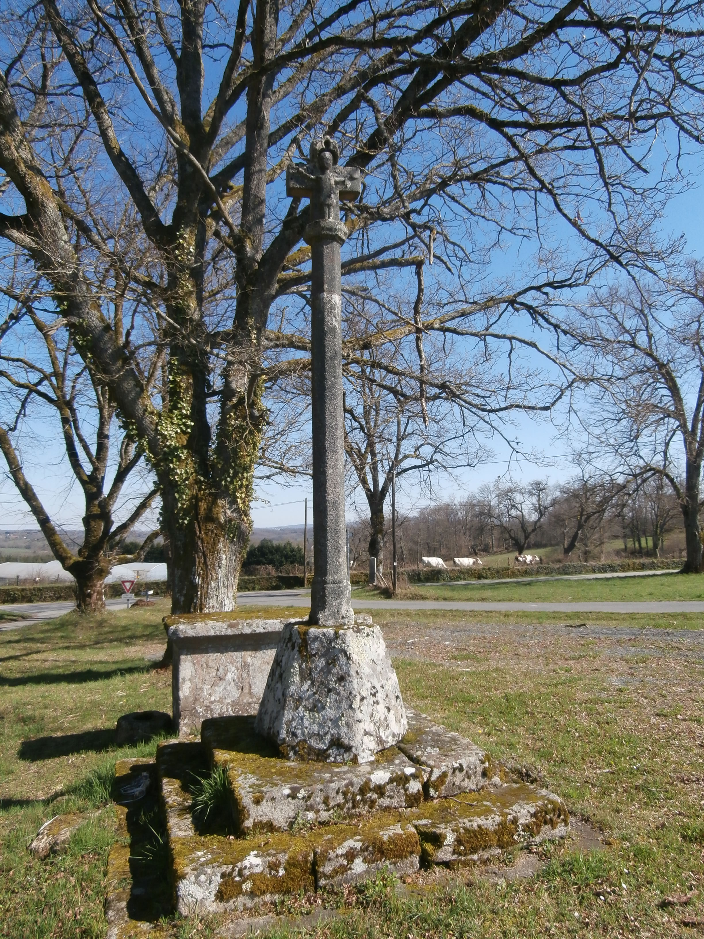 Croix sculptée XIVe ou XVe siècle d'un Christ en croix et d'une vierge à l'enfant